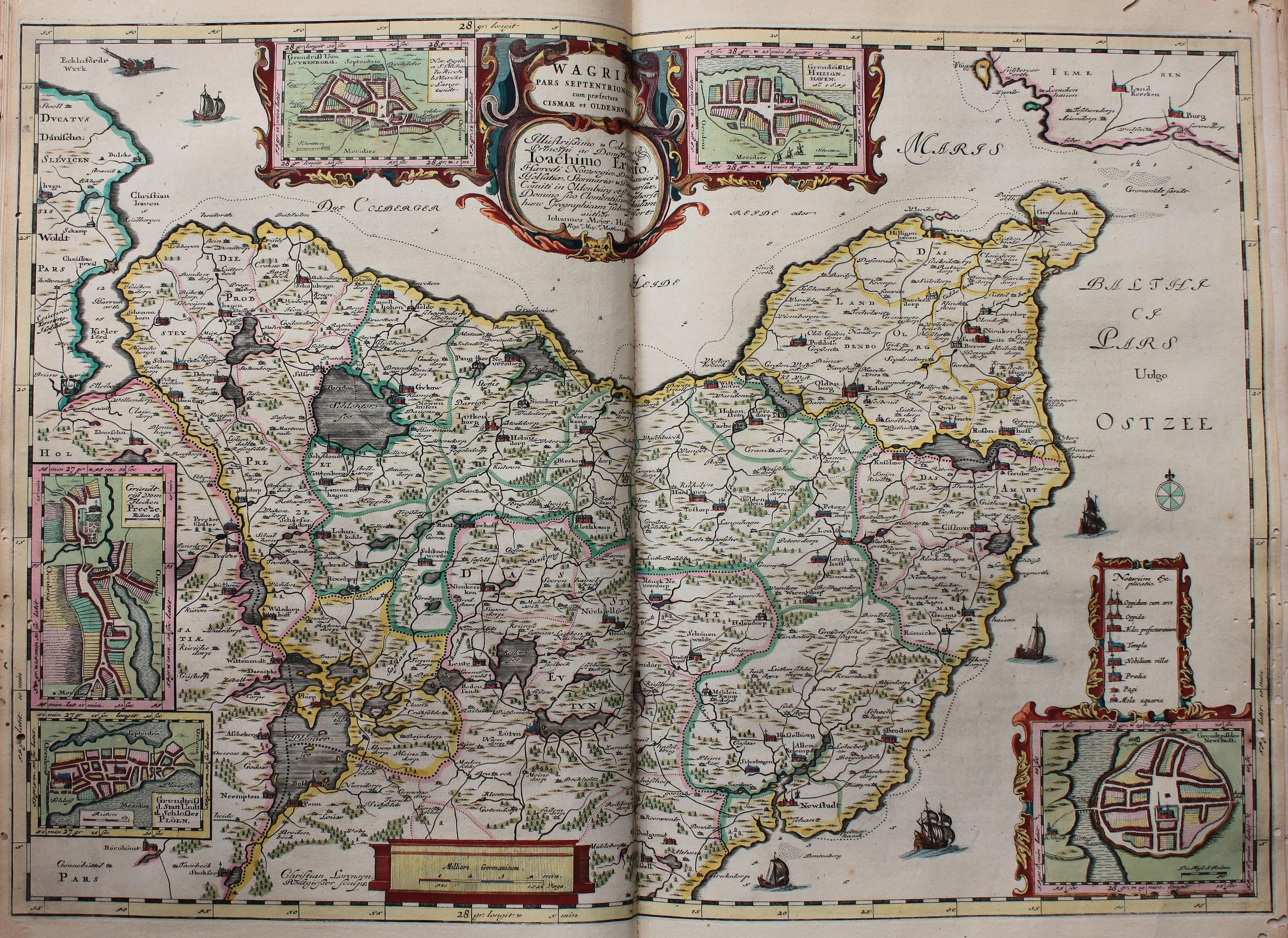 Descripción bibliográfica: Geographia Blaviana. - [Amsterdam : Juan Blaeu, 1659] . - [32], VI, 96 p., 34 f., h. 35a, 35b, 35c, 35d, 36-44 f., 34, [2], 36-40, [2], 43-70 [i. e. 75], [1] f., [20] p. de map., [9] f. de map., [4] f. pleg. de map., [2] f. de plan., [2] f. ge grab. : |bil. ; |cFol. marca major (57 cm.) . - En la dedicatoria a Felipe IV: "Presenta ... El Atlas Universal y Cosmographico de los orbes y terrestre ... Juan Blaeu" . - Título tomado del frontispicio. -- Privilegio fechado en 1659. -Errores de pag. - Sign.: 1, *2, **3, ***-****2, a-e2, A-I2, K1, L-Z2, Aa-Dd2, 4 2, Ee-Ff2, A-I2, K1, L2, M1, N-Y2, Z5, Aa-Dd2, Ee1, A-D2, E-F1, G-I2, K-L1, M-O2, P1, Q-Z2, Aa-Bb2, Cc1, Dd3, Ff-Zz2, Aaa-Bbb2, . - Frontispicio grab. col. -- Incluye un total de 49 il. entre map., plan. i grab. Materia: Atlas - Obras anteriores a 1800 Impresor: Blaeu, Joan, 1596-1673, imp. Lugar de impresión: Holanda. Amsterdam Localización: Vea la ilustración en su contexto Visite también la exposición "Cartografía histórica en la Biblioteca de la Universidad de Sevilla"